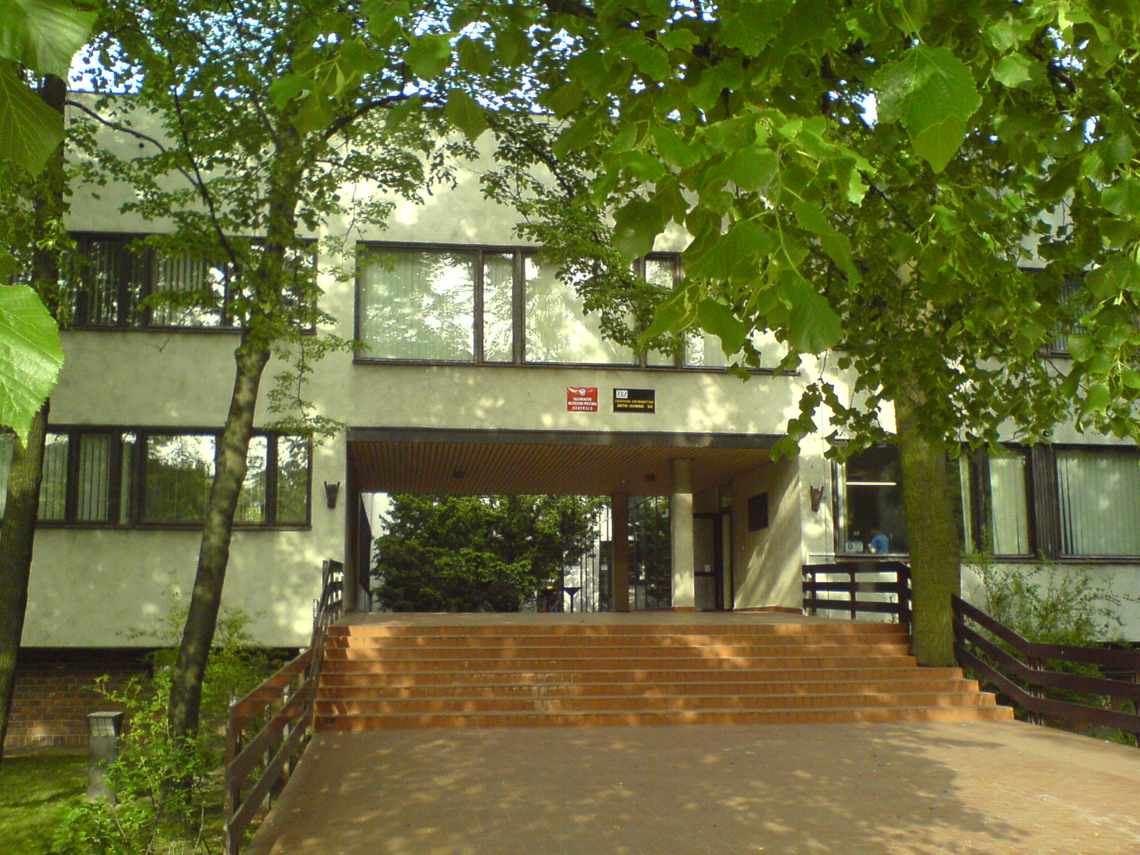 PL, Warszawa, Kasa Rolniczego Ubezpieczenia Społecznego - Centrala, Al. Niepodległości 190